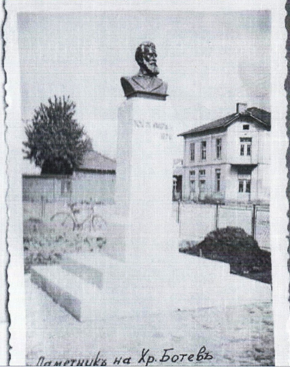 Бюст-паметникът на Христо Ботев на ъгъла на ул. „Гурко“ и бул. „България“ в Ботевград след откриването му на 2 юни 1939 г.